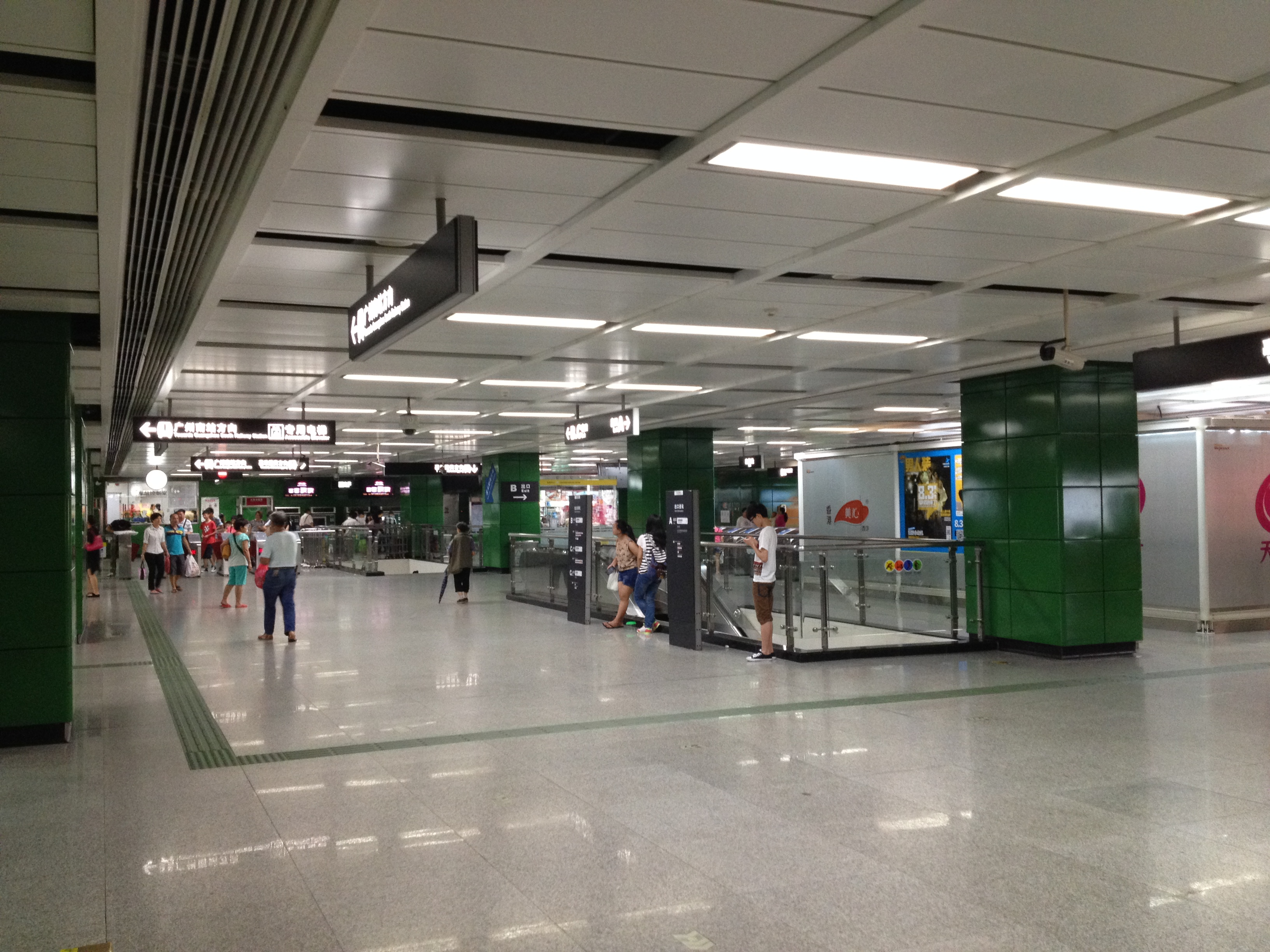 广州地铁东晓南站站厅